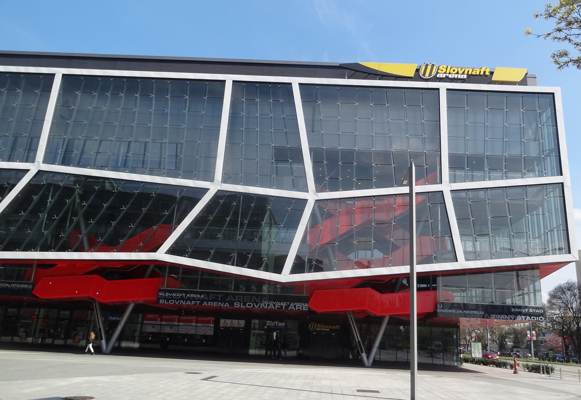 Slovnaft arena 2014